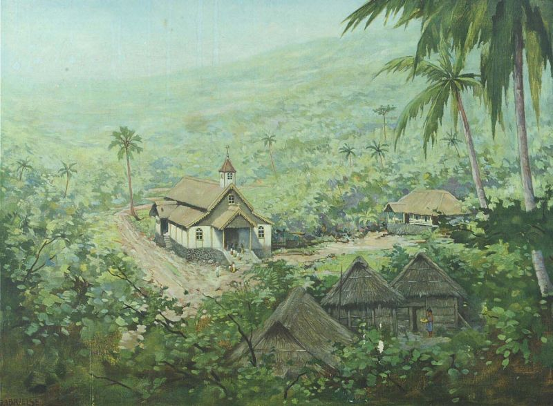 Schoolplaat. Deze litho is gemaakt naar een schilderij van Johan Gabriëlse, en is onderdeel van de reeks van 15 litho's van Henri Zondervan, "Insulinde in woord en beeld". Uitgegeven door J.B. Wolters, Groningen/'s-Gravenhage. Kleurenlitho van een kerk op Lomblen